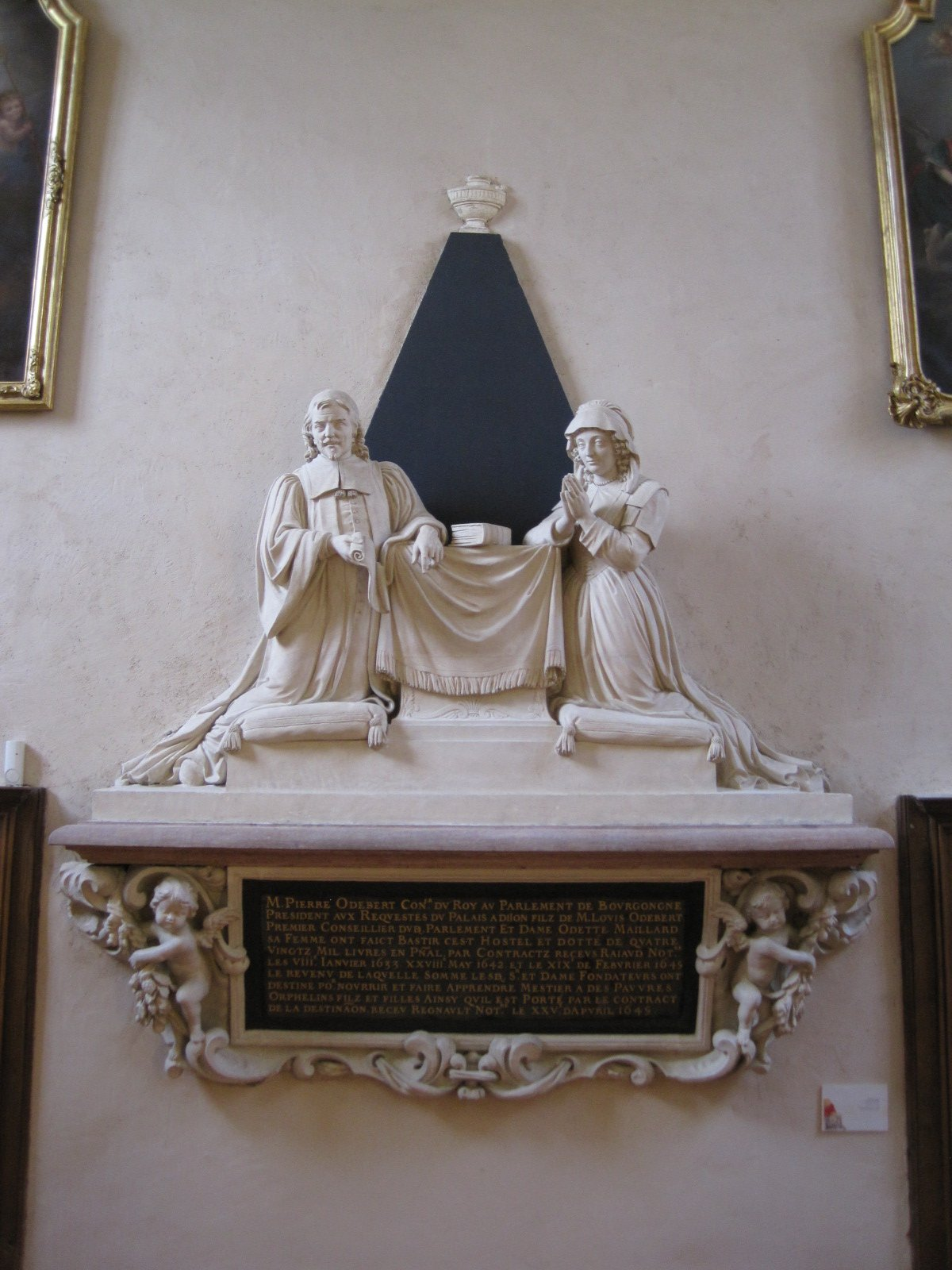 Cénotaphe de Pierre Odebert et Odette Maillard, fondateurs de l’Hospice Sainte-Anne de Dijon, de sculpteur Nicols Bornier, musée d'art sacré de Dijon